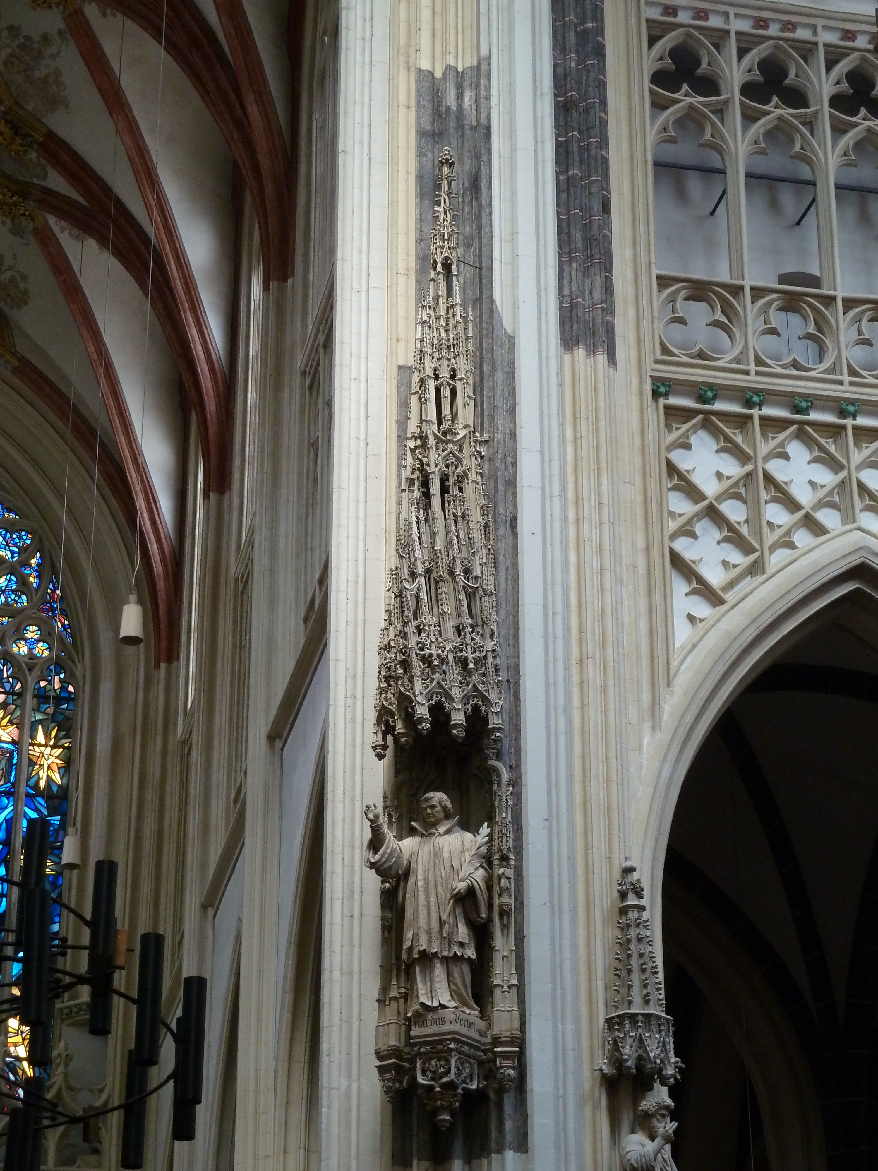 Clocher tors, Bois-le-Duc, Pays-Bas